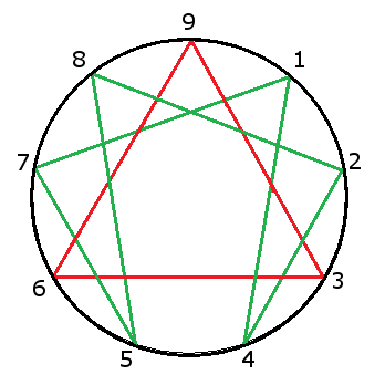 Enneagram symbol